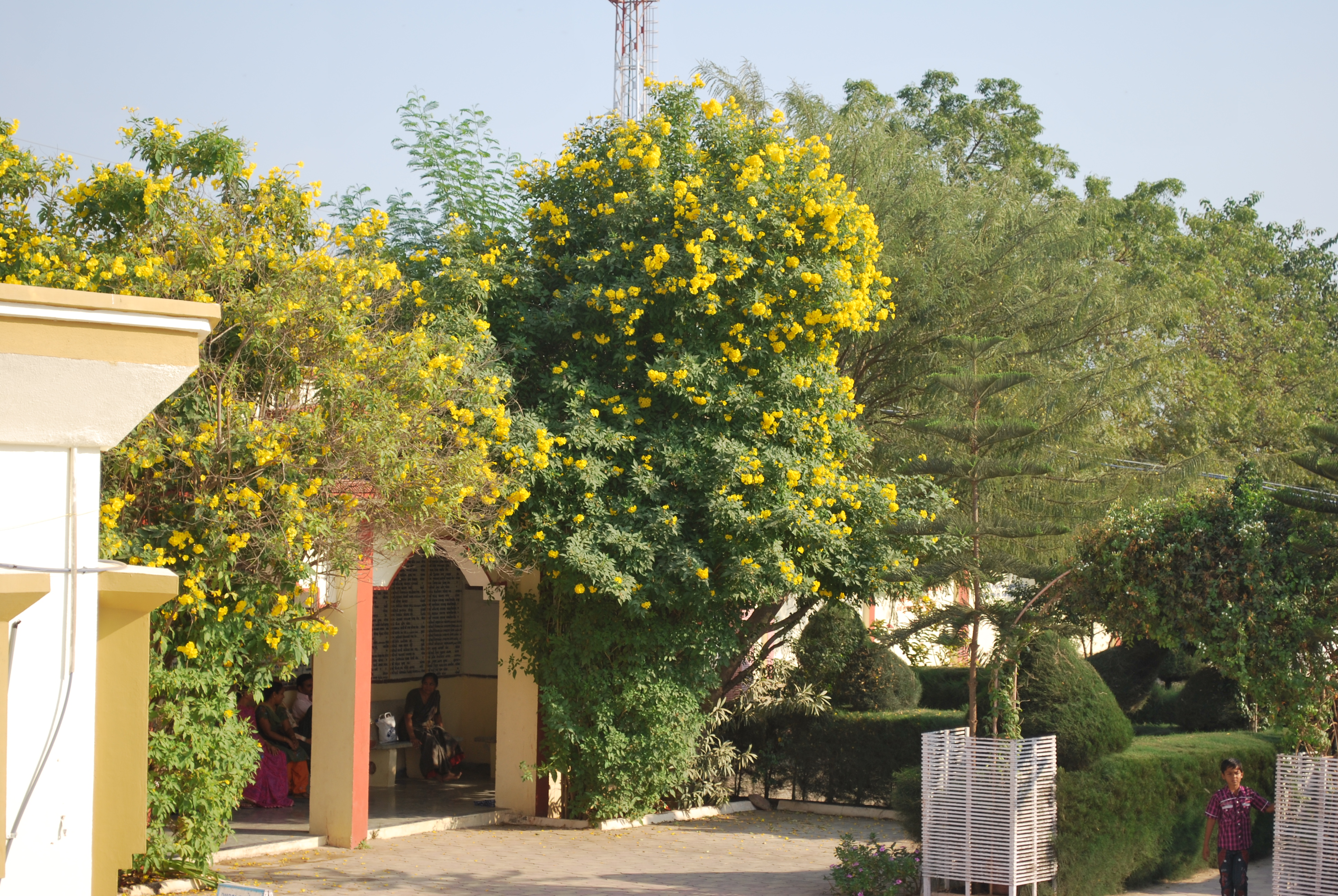 Godhra, Gujarat 370450, India